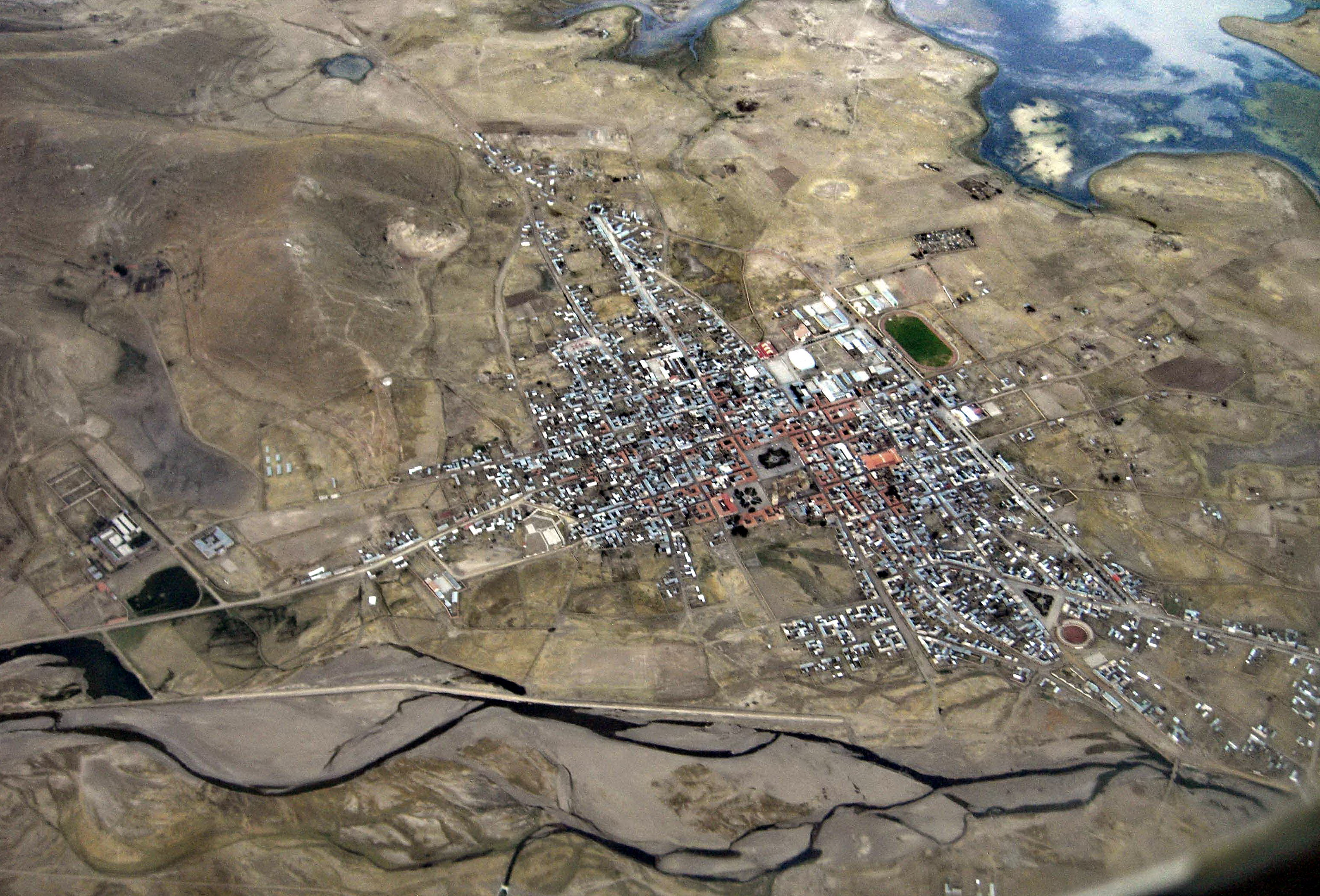 Vista Aerea de Lampa Puno